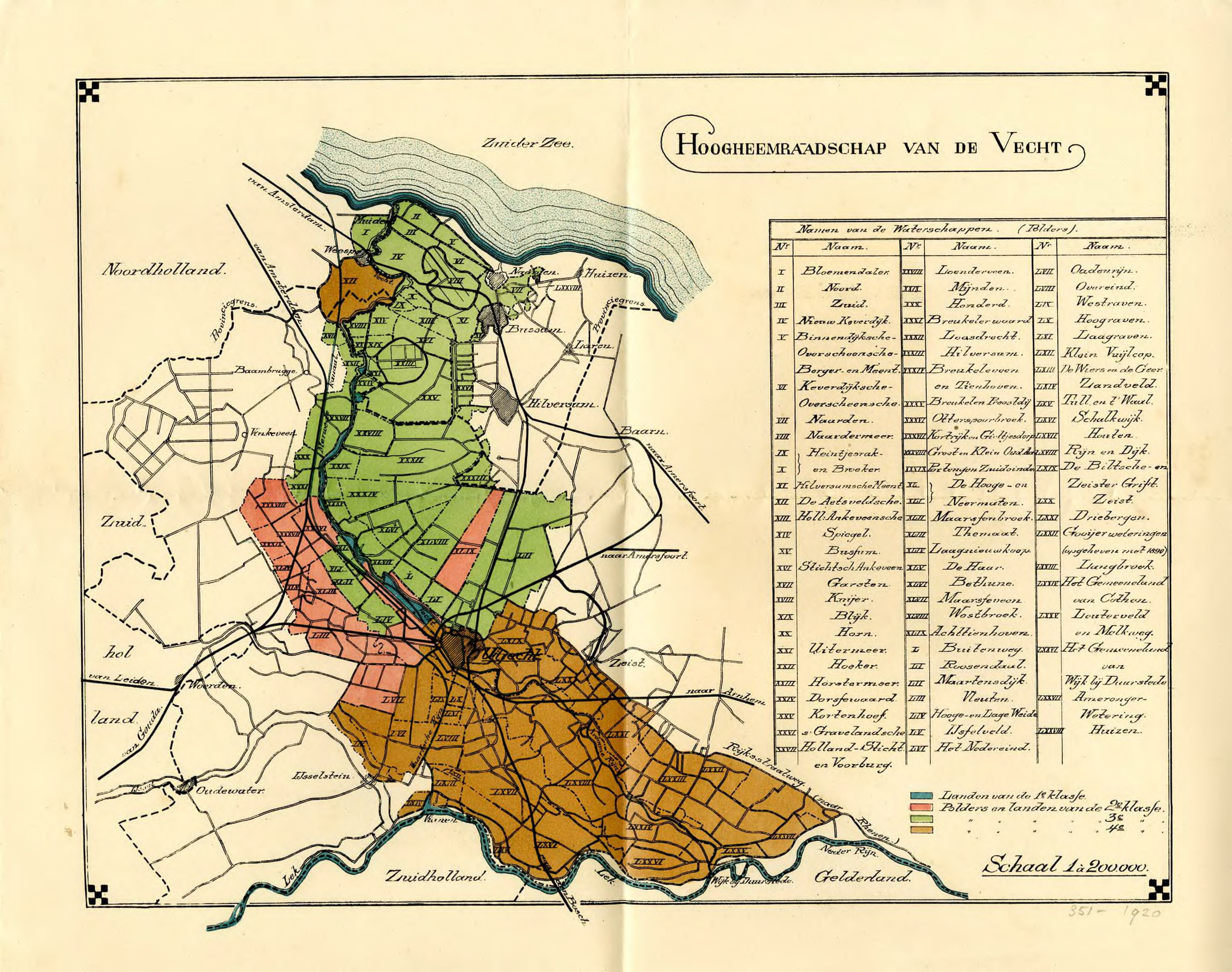 Hoogheemraadschap van de Vecht